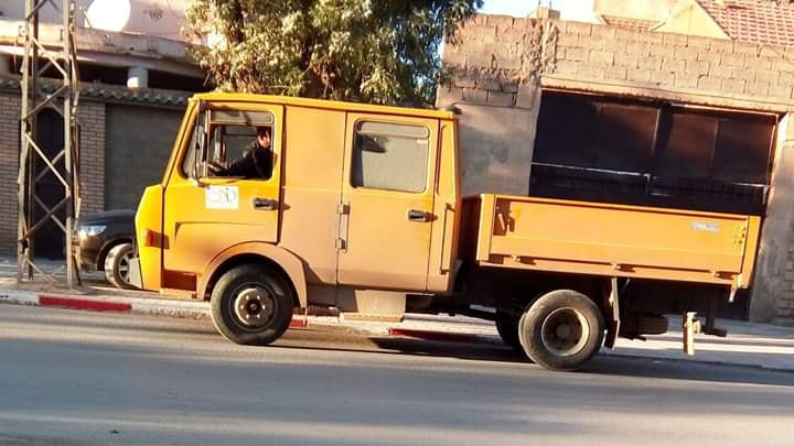 SNVI K66 Déclinaisons Double Cabine